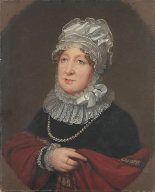 Kurfürstin Wilhelmine Caroline (1747-1820), Tochter König Friedrichs V. von Dänemark